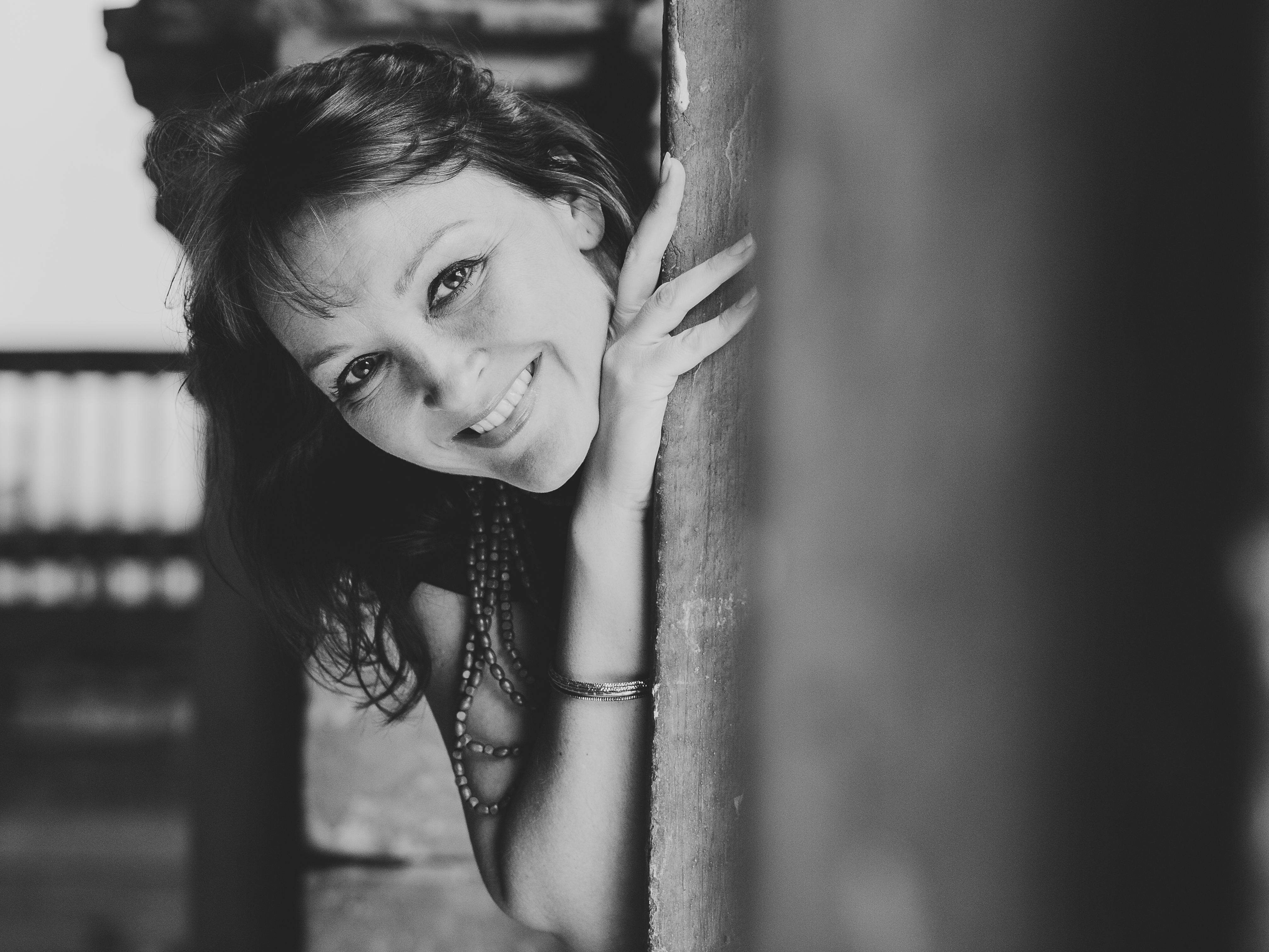 Michaela Šrůmová